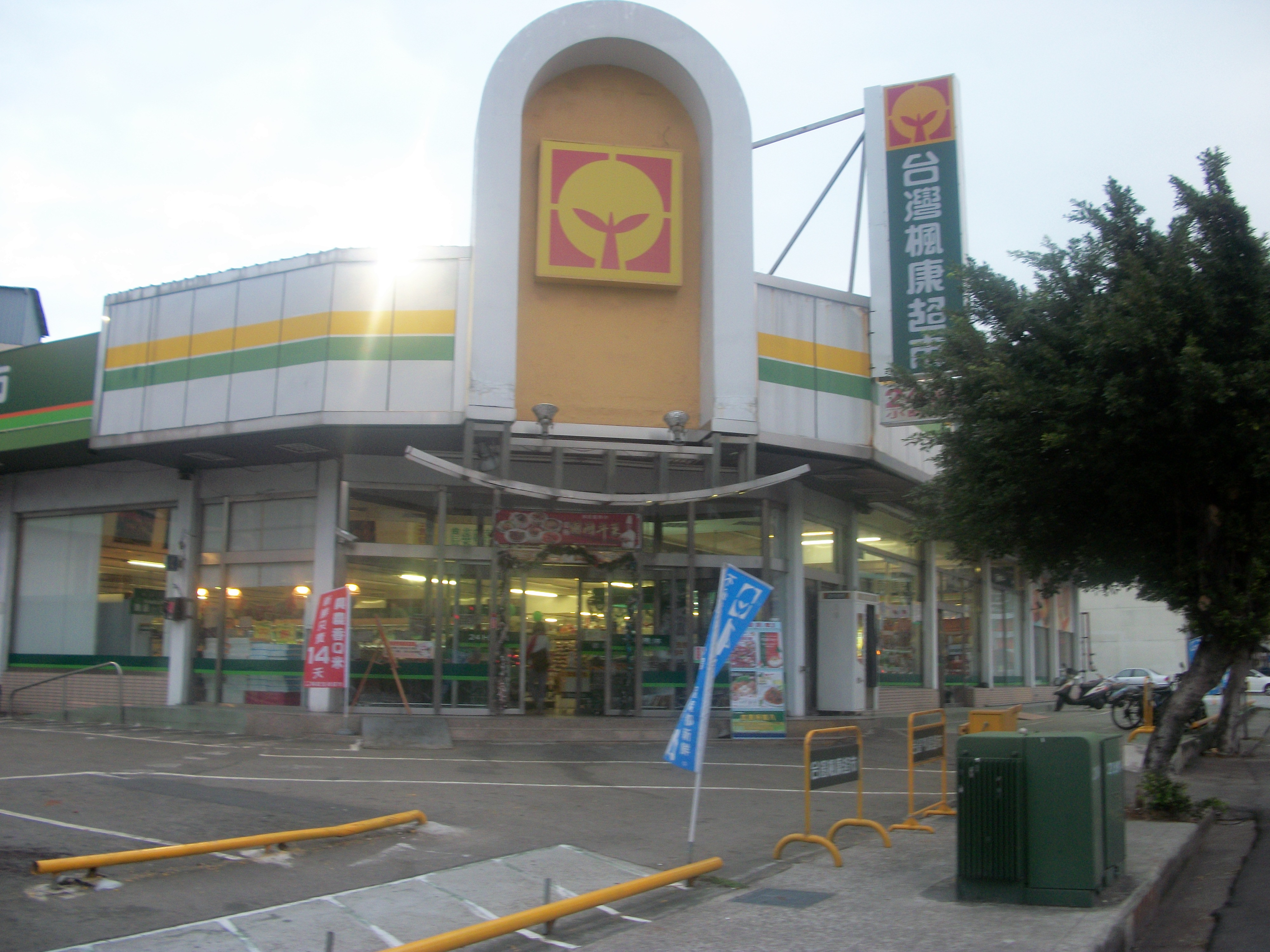 中文（台灣）: 台灣楓康超市三民店，地址：臺中市北區三民路三段345號。